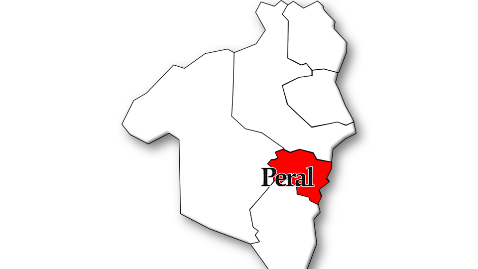 População